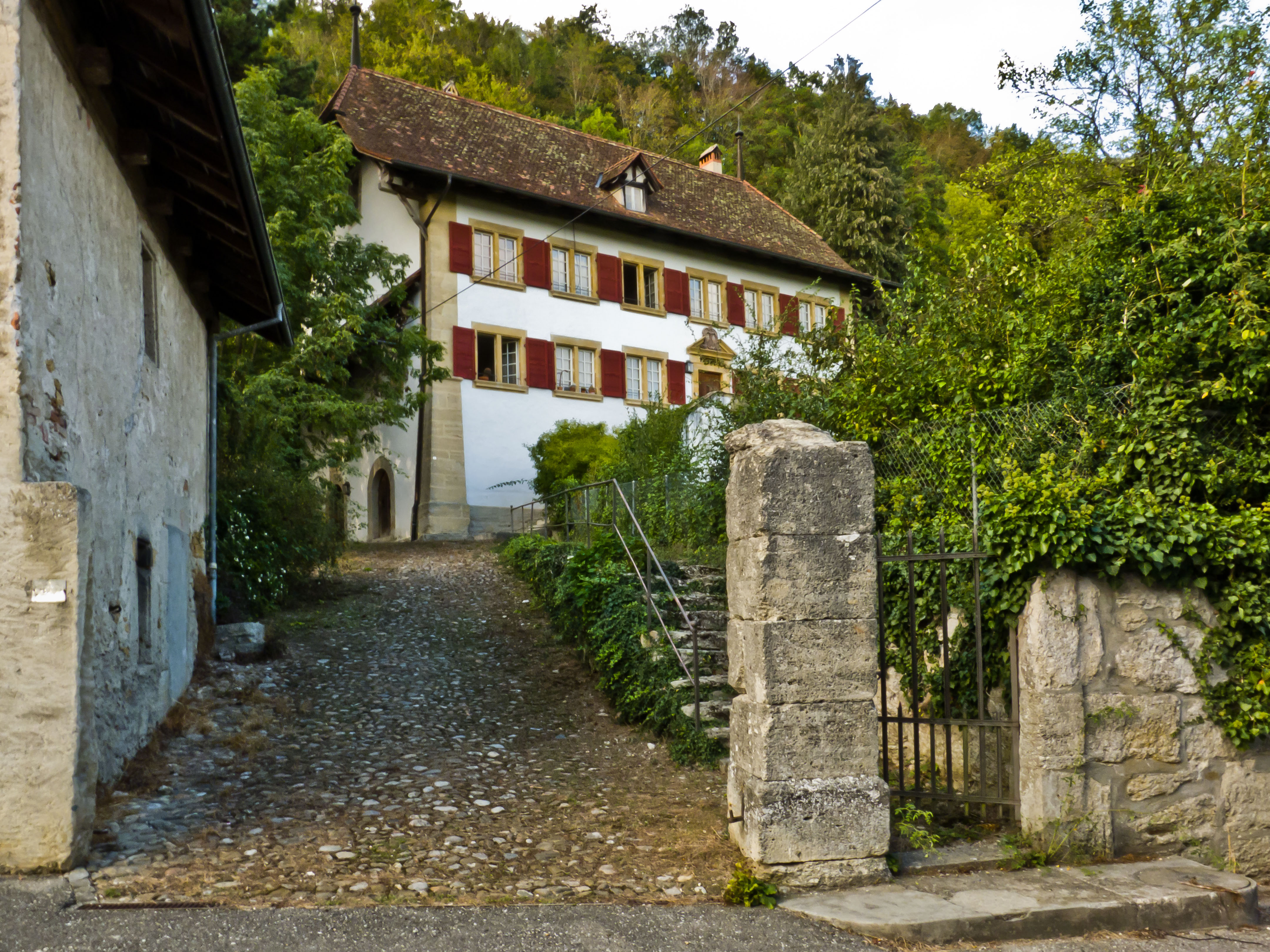 Gampelen, Pfarrhaus, altes Tor.